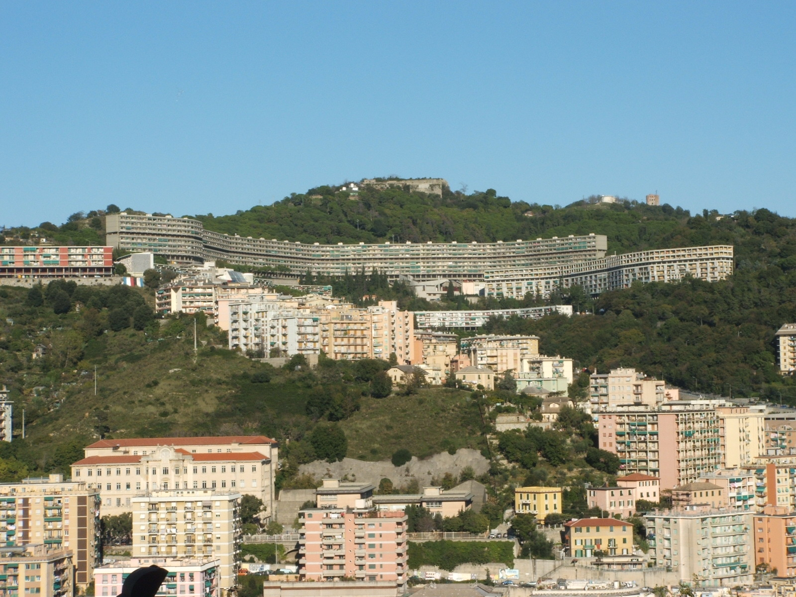 Immagine da Genova